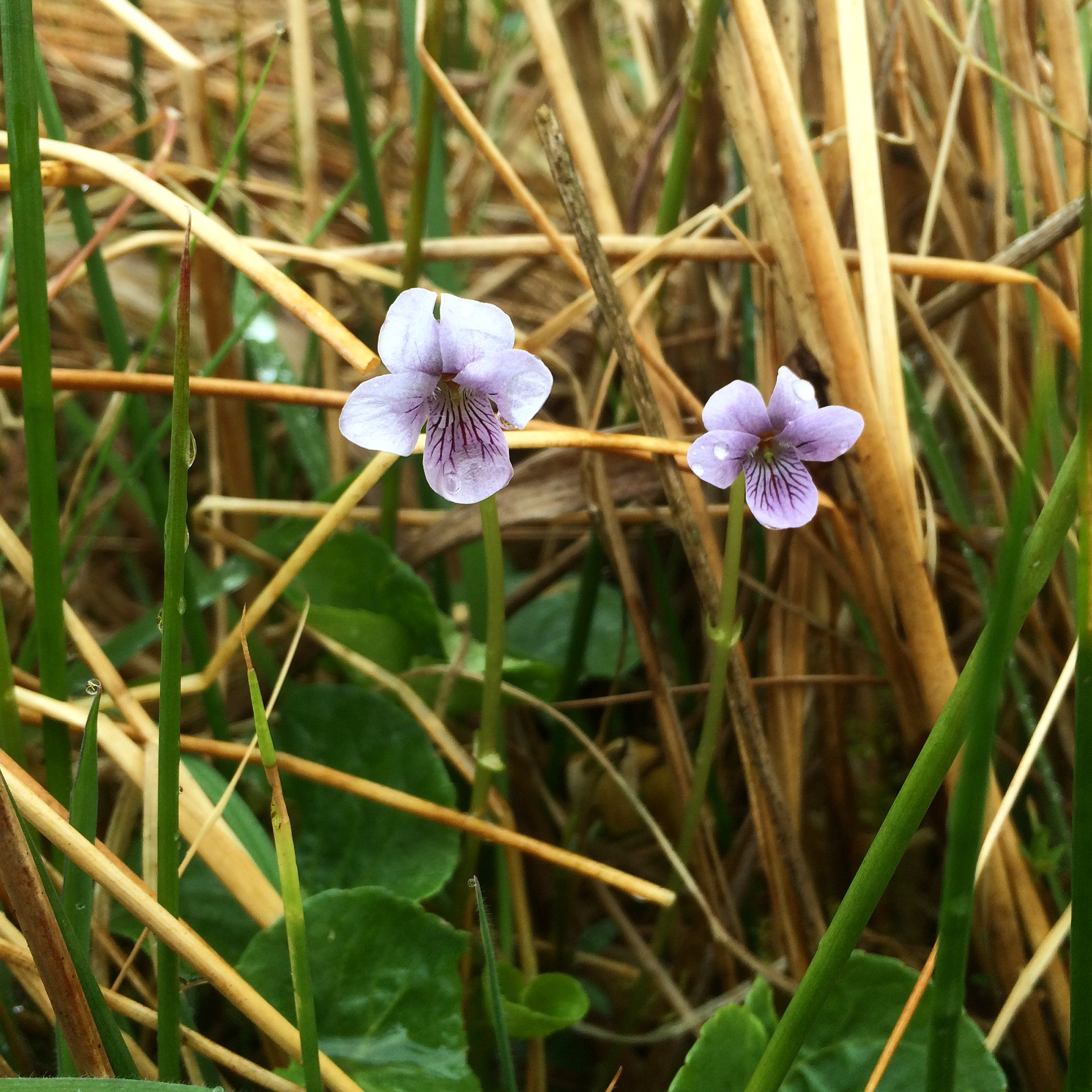 Fioled y gors, Cors Dyfi.